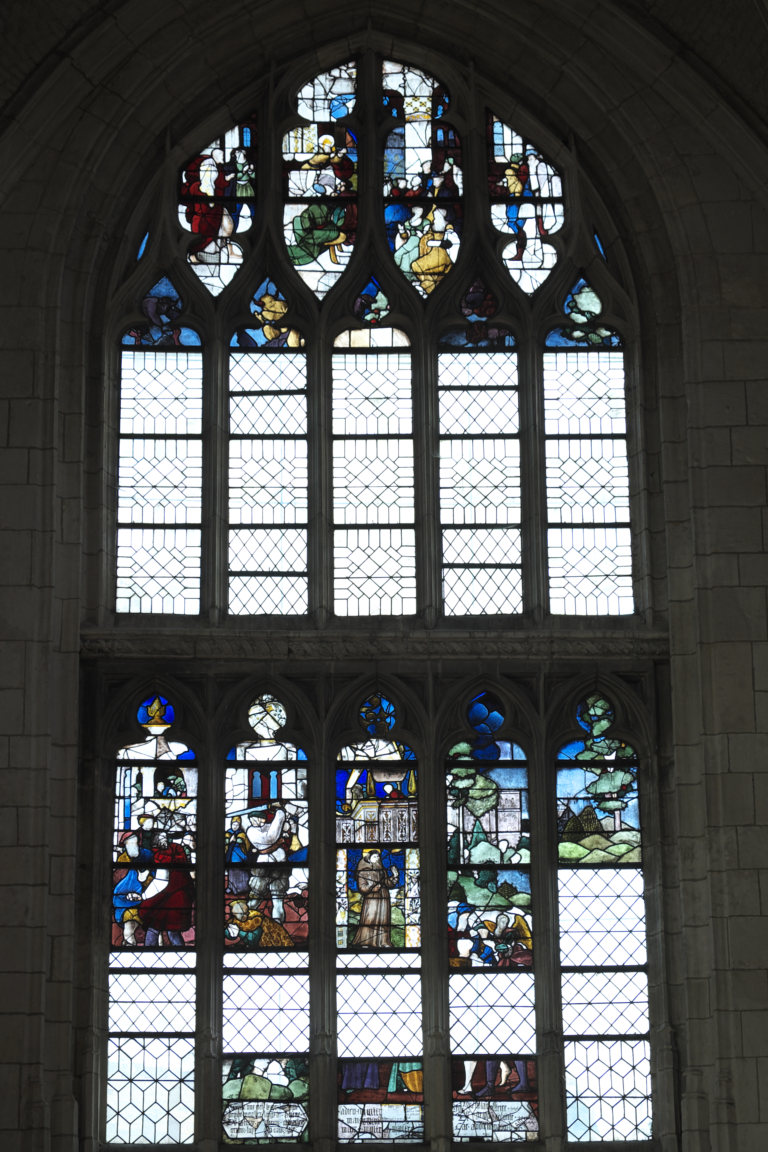 Katholische Kirche Saint-Pierre und Saint-Paul in Aumale im Département Seine-Maritime (Haute-Normandie/Frankreich), Fragmente von Bleiglasfenstern aus dem 16. Jahrhundert